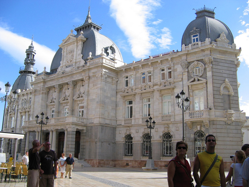 Palacio Consistorial de Cartagena. Obra modernista de Tomás Rico Valarino de 1907.